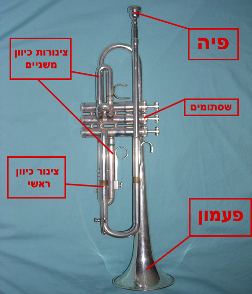 הסבר החלקים של החצוצרה.